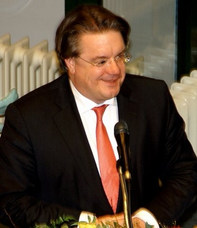 Wim van de Donk speaking in Sint Anthonis.